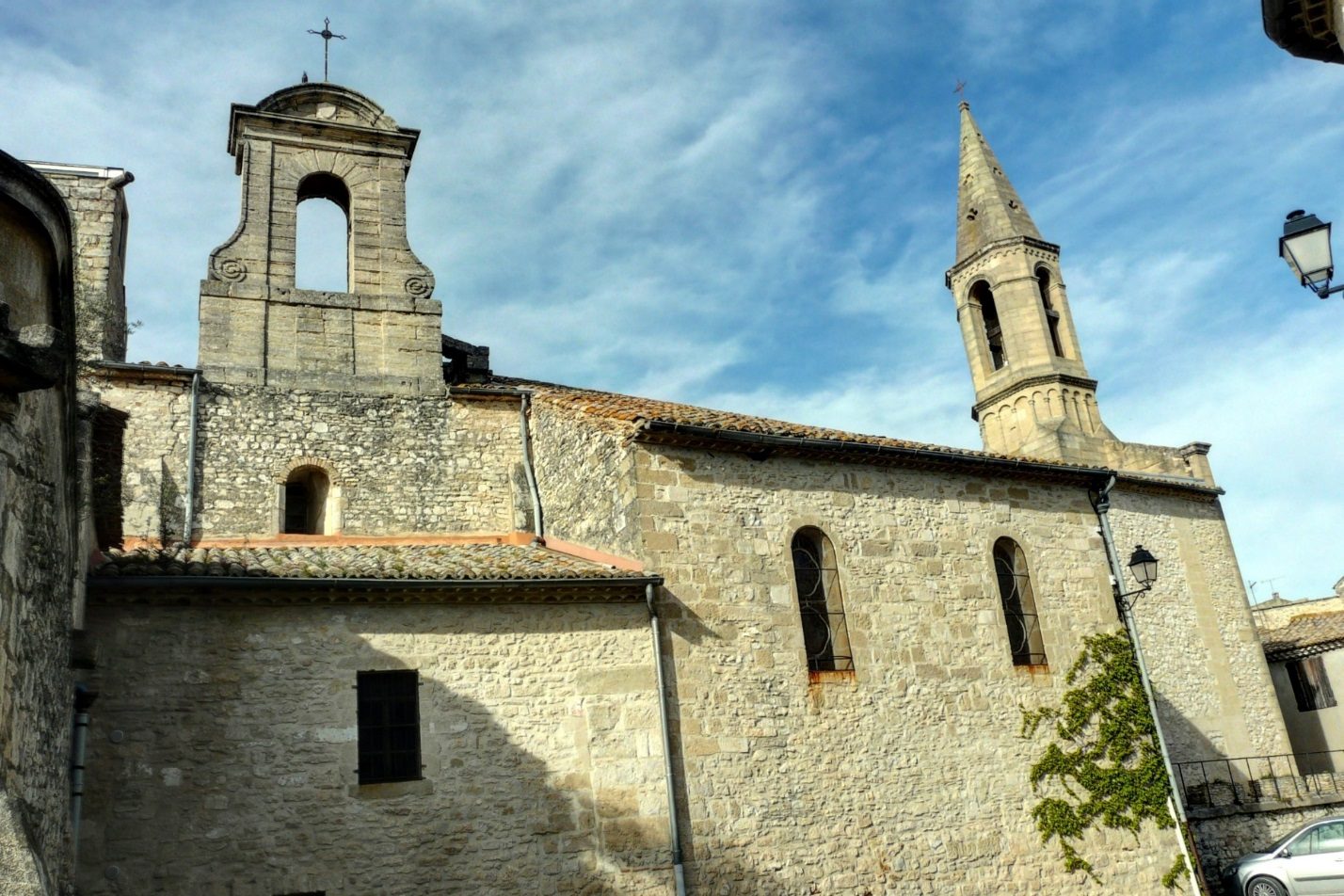 Église Saint-Maximin du village de Saint-Maximin, Gard